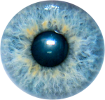 Description: Iris de l'œil Source: Luc Alquier Licence: GFDL Luc Alquier